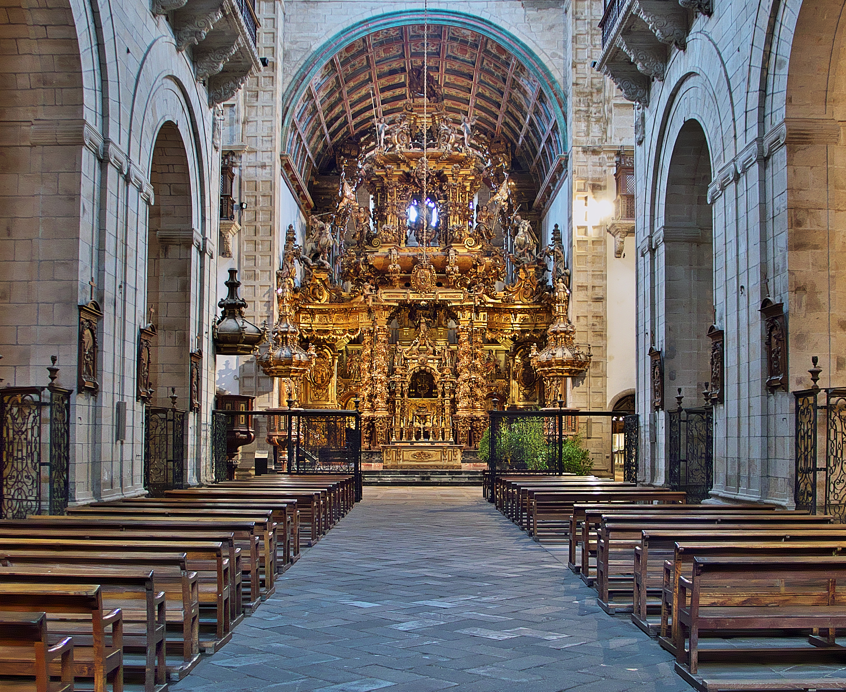 Siglo XVIII. Magnífico retablo (1730-1733). Diseña, Fernando de Casas y Novoa, ejecuta Miguel de Romay.